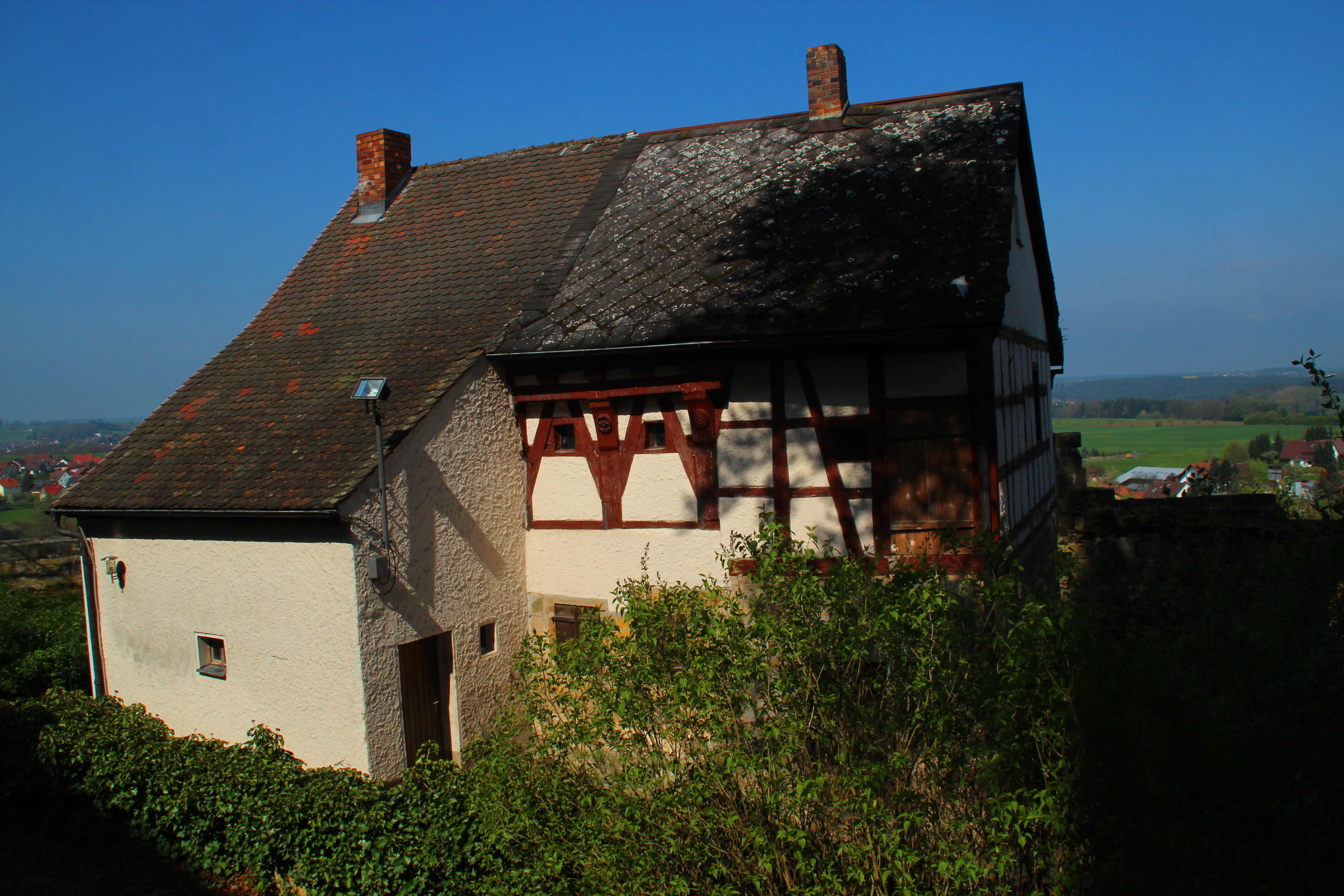 ehem.Glockenhaus (Kirchenburg Gesees)